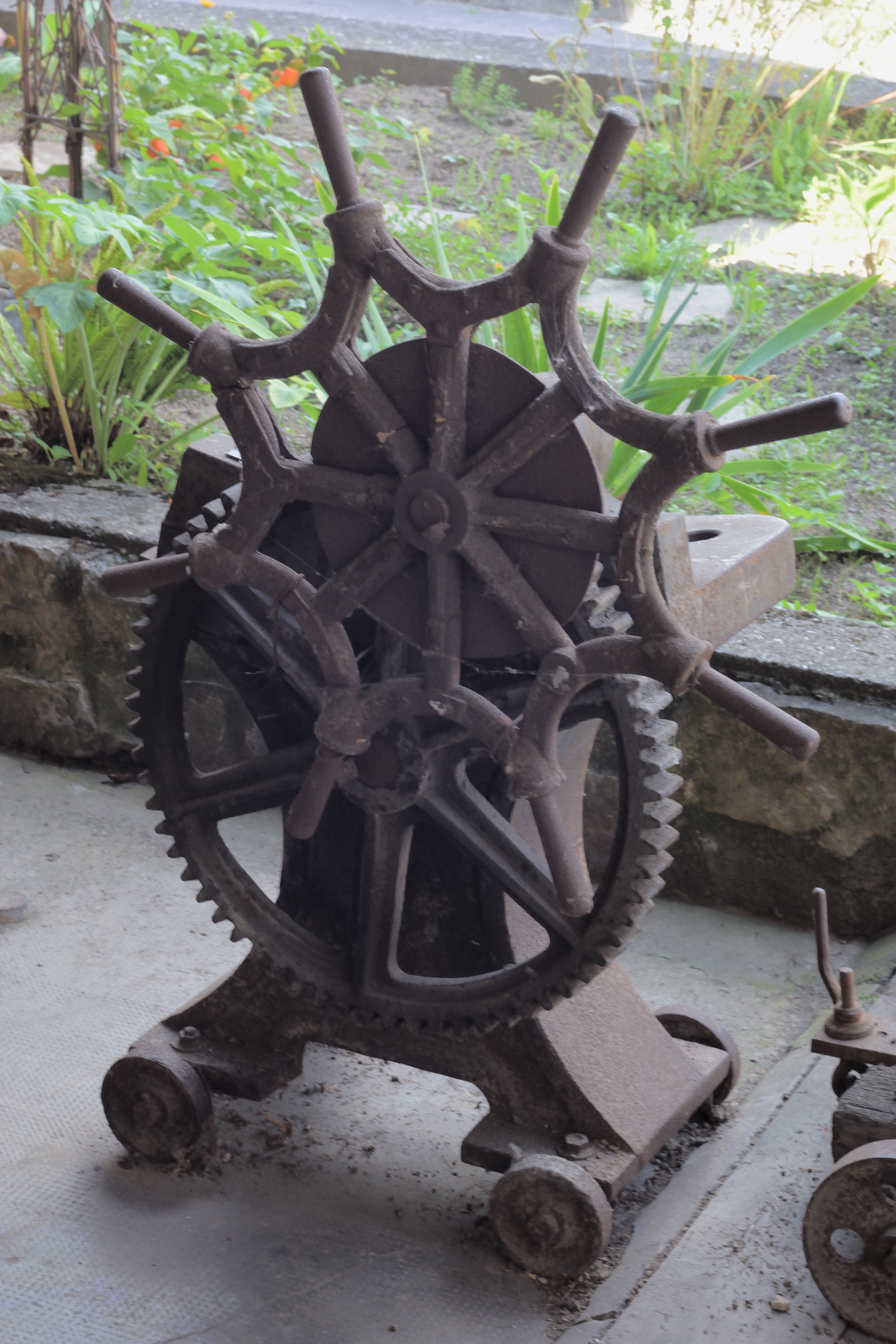 Reifenstauchmaschine in der historischen Schmiede von Geisingen, Stadt Freiberg am Neckar. Gestiftet von Walter-Plessing, Schlosserei und Stahlbau, Remseck-Aldingen